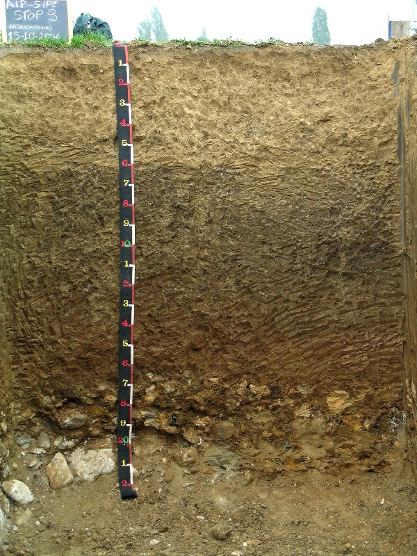 Soil Profile (Alfisol)